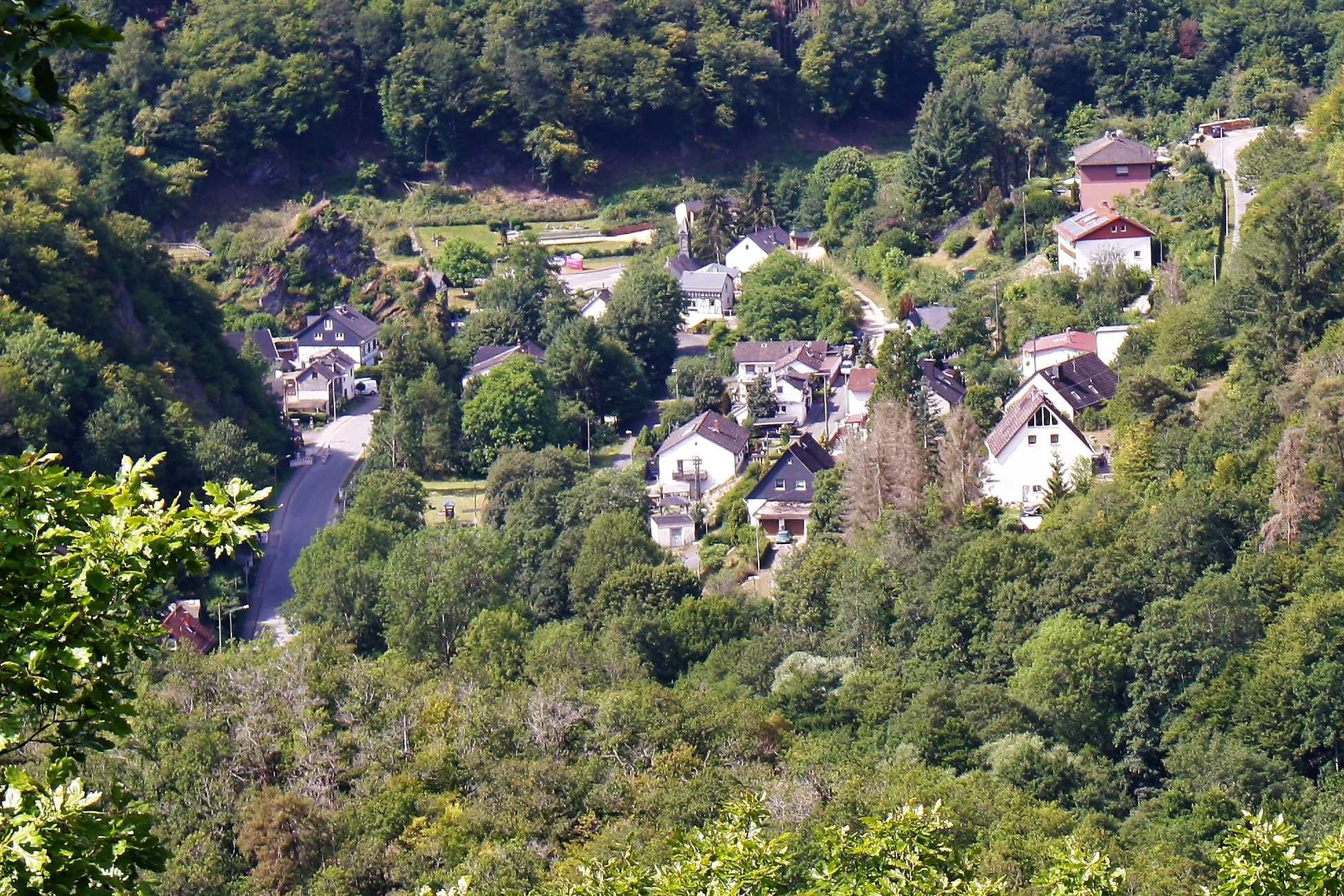 Geroldstein ein Ortsteil von Heidenrod im Rheingau-Taunus-Kreis in Hessen